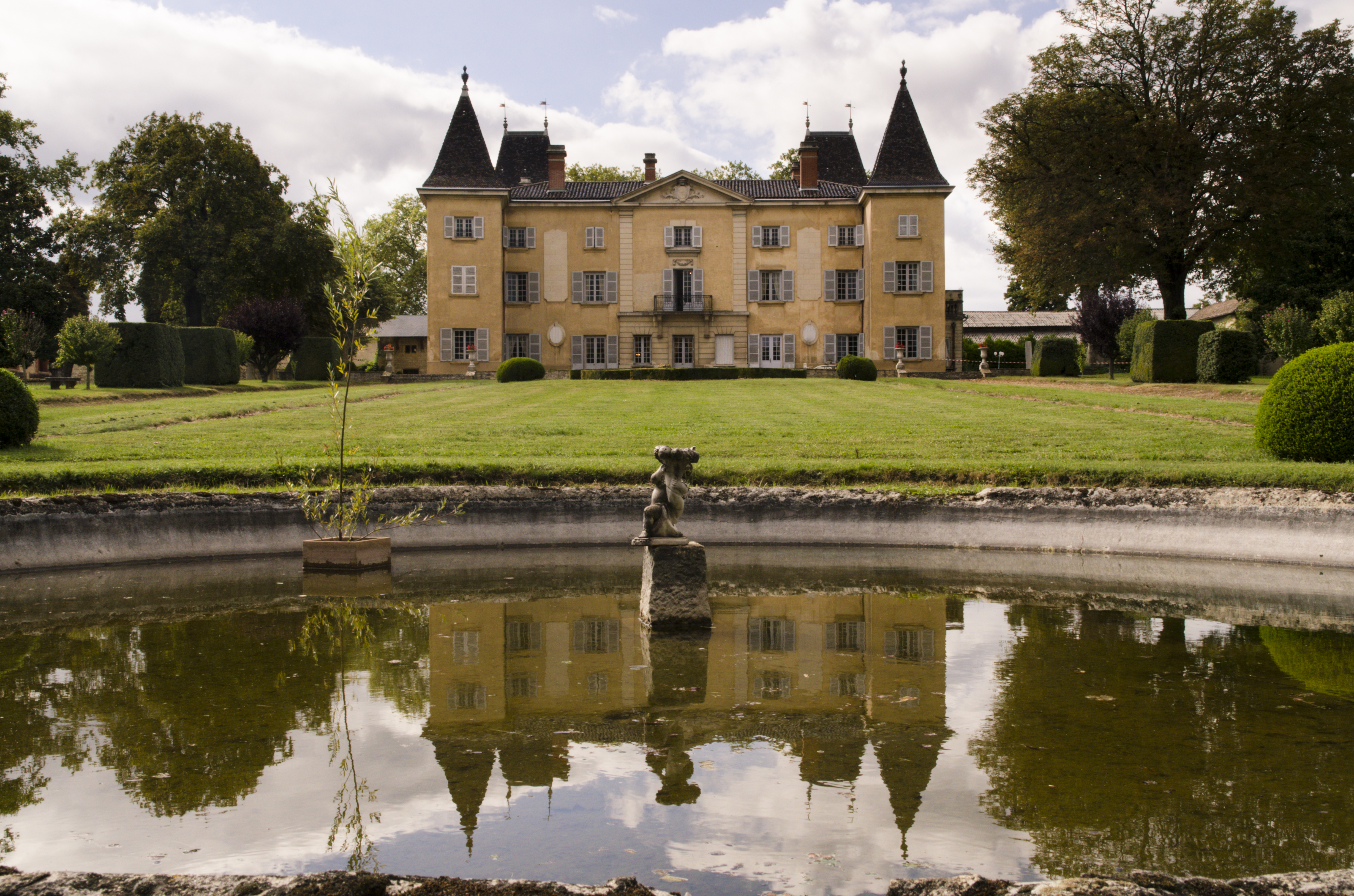 Château de Vaurenard, Rhône, France Château et son reflet .